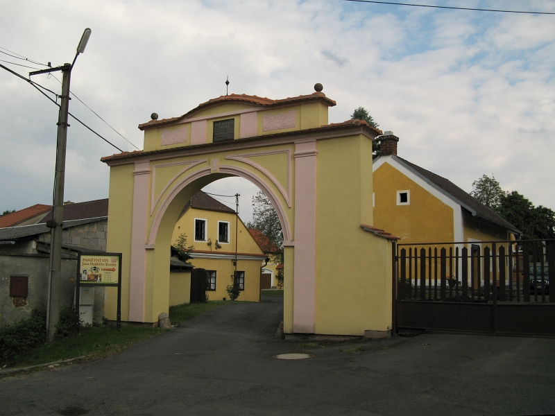 Venkovská usedlost (Újezd), Újezd 3